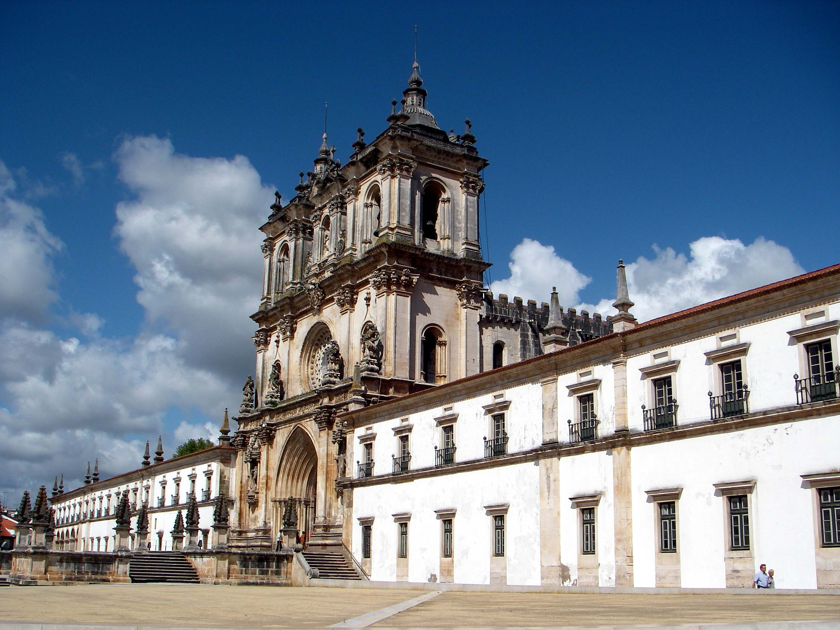 Mosteiro de Alcobaça